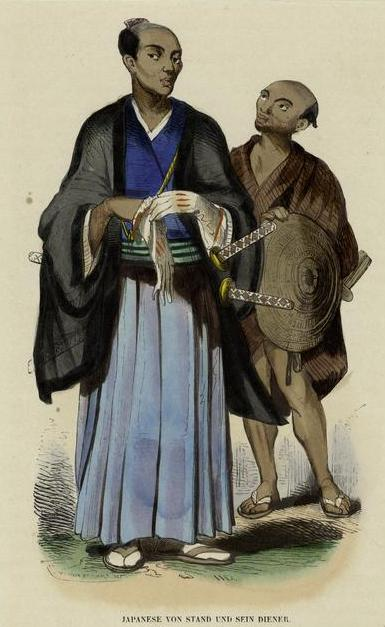 Japanese [samurai] of importance and servant. Original caption: Japanese von Stand und sein Diener. Published in Die Völker des Erdballs : nach ihrer Abstammung und Verwandtschaft, und ihren Eigenthümlichkeiten in Regierungsform, Religion, Sitte und Tracht by Heinrich Karl Wilhelm Berhaus, published 1845-1847.